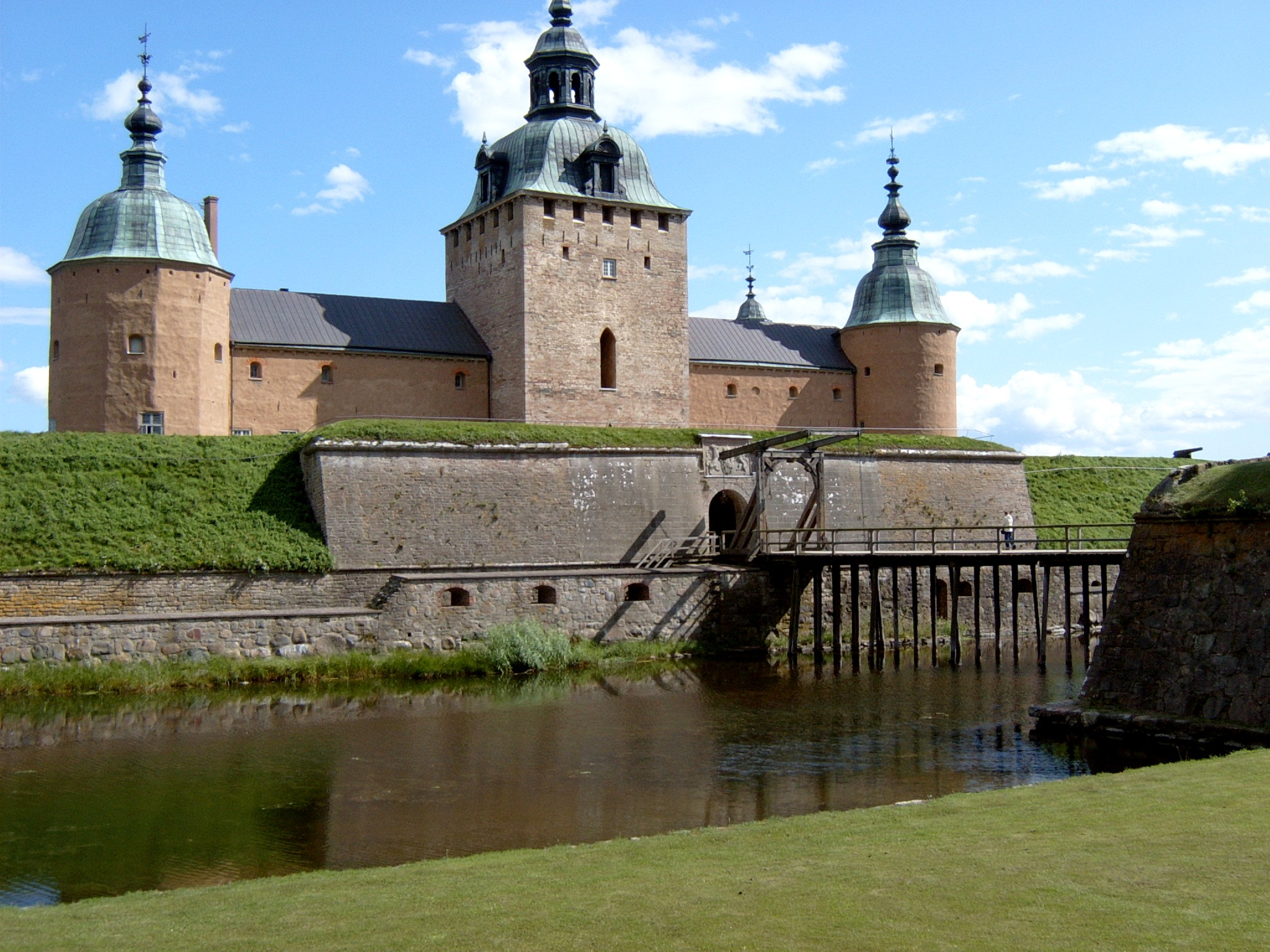 Schloss in Kalmar